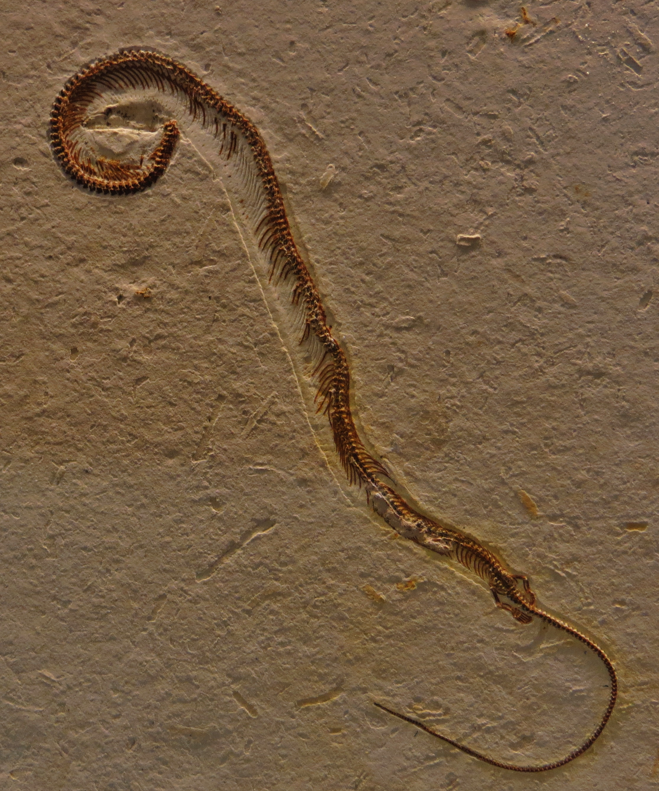 Took the picture at Burgmeister Muller Museum, Solnhofen